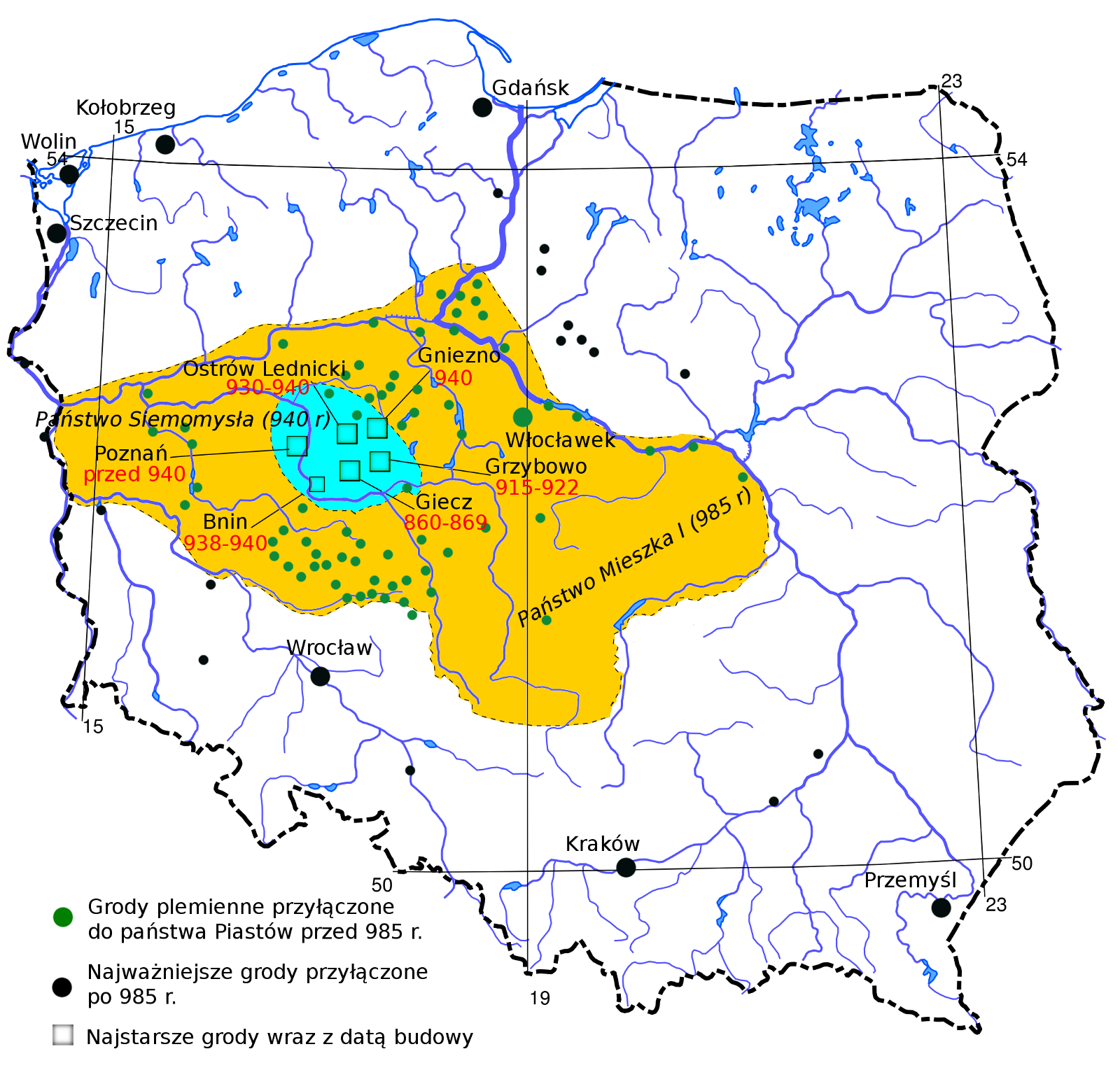 Najważniejsze grody w okresie panowania Mieszka I.